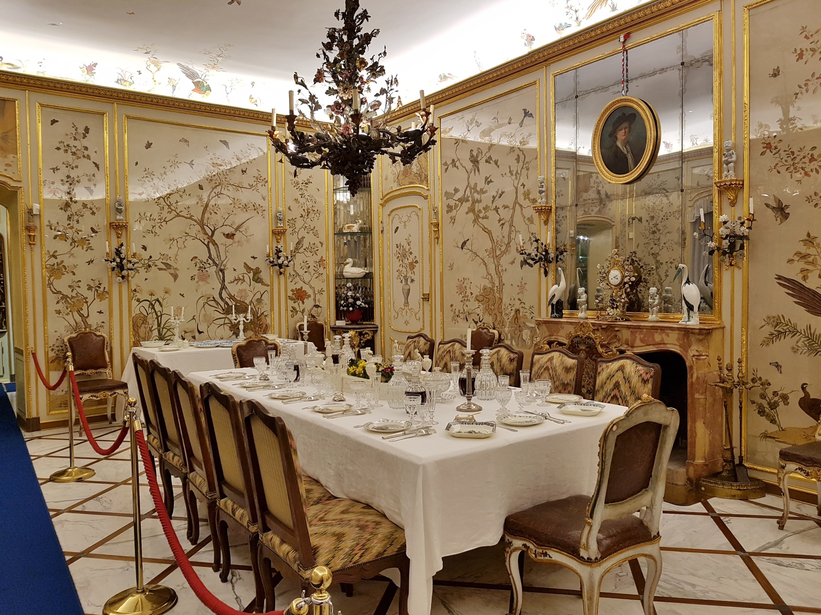 Sala da pranzo, Museo di Arti Decorative Accorsi–Ometto, Torino